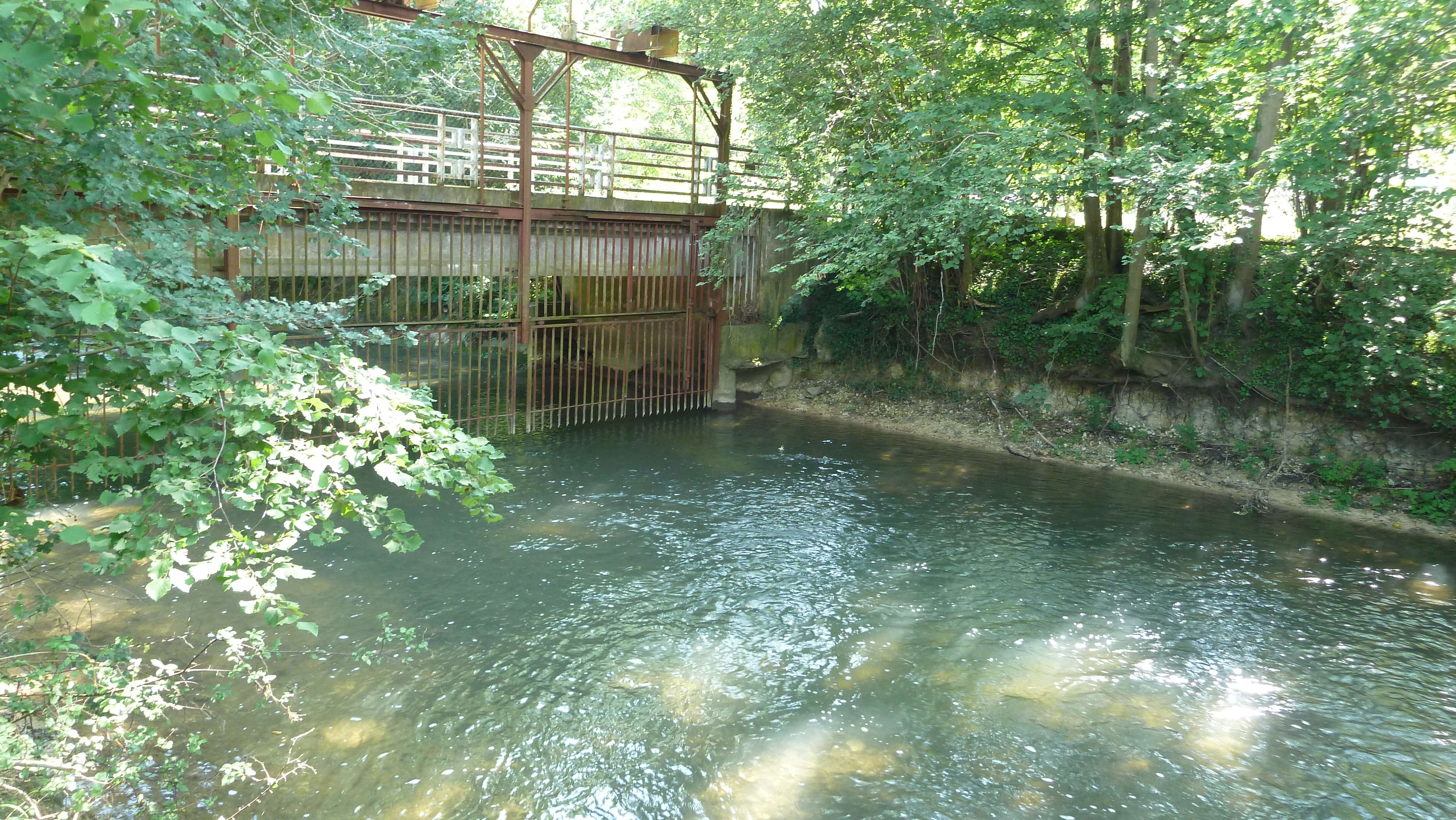 La Bèze à son entrée sur le site de la poudrerie de Vonges.